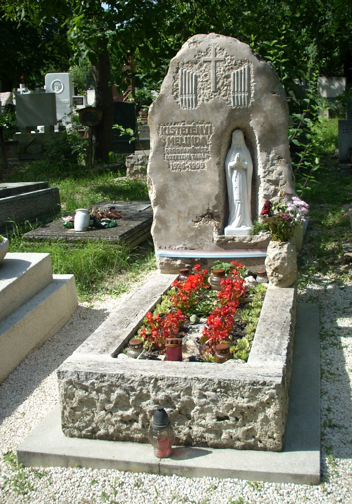 Kistétényi Melinda (1926-99) orgonaművész sírja a Farkasréti temetőben [25-4-5] (Budapest XII. ker., Farkasréti temető)